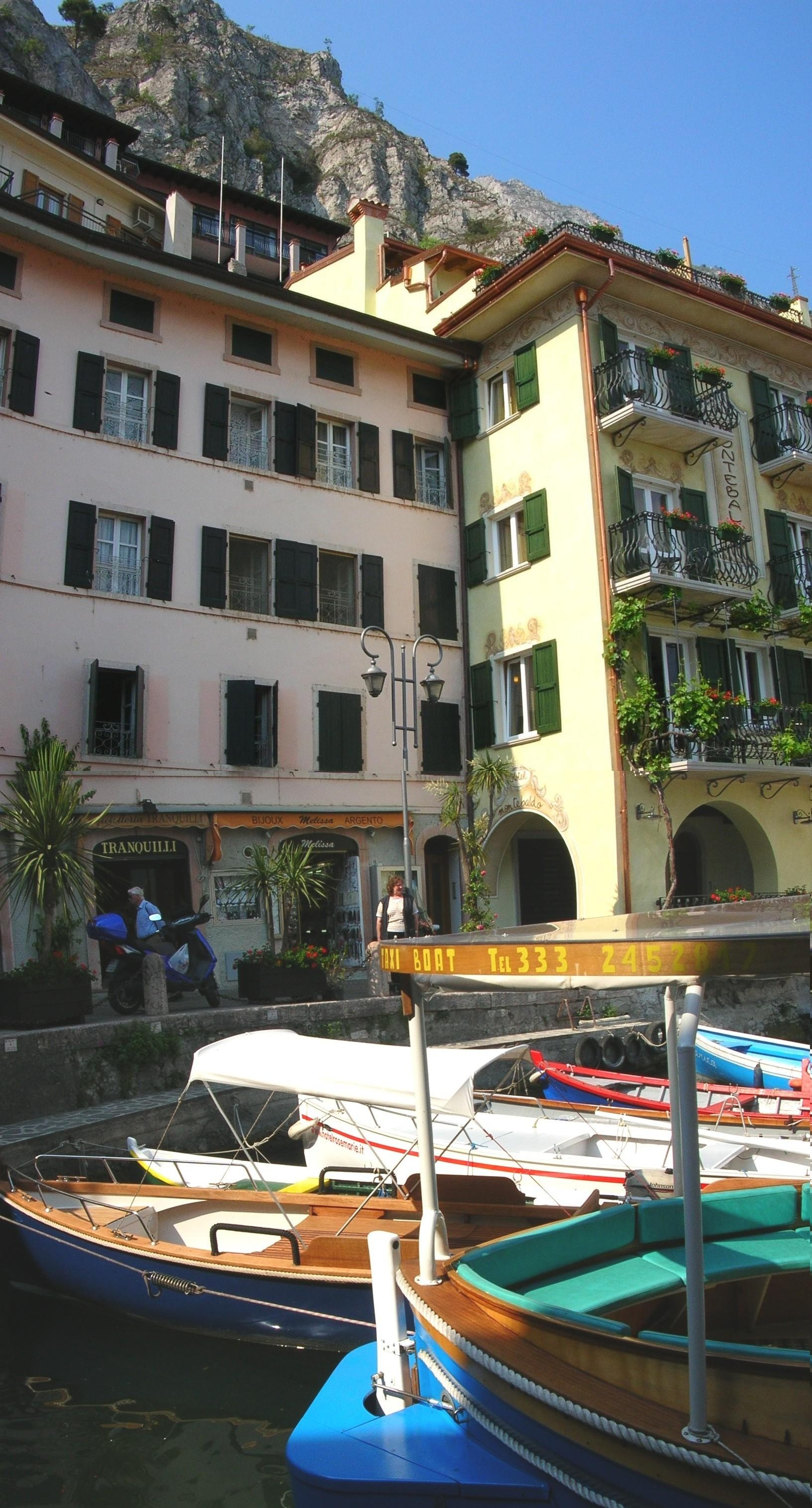 Limone Harbour